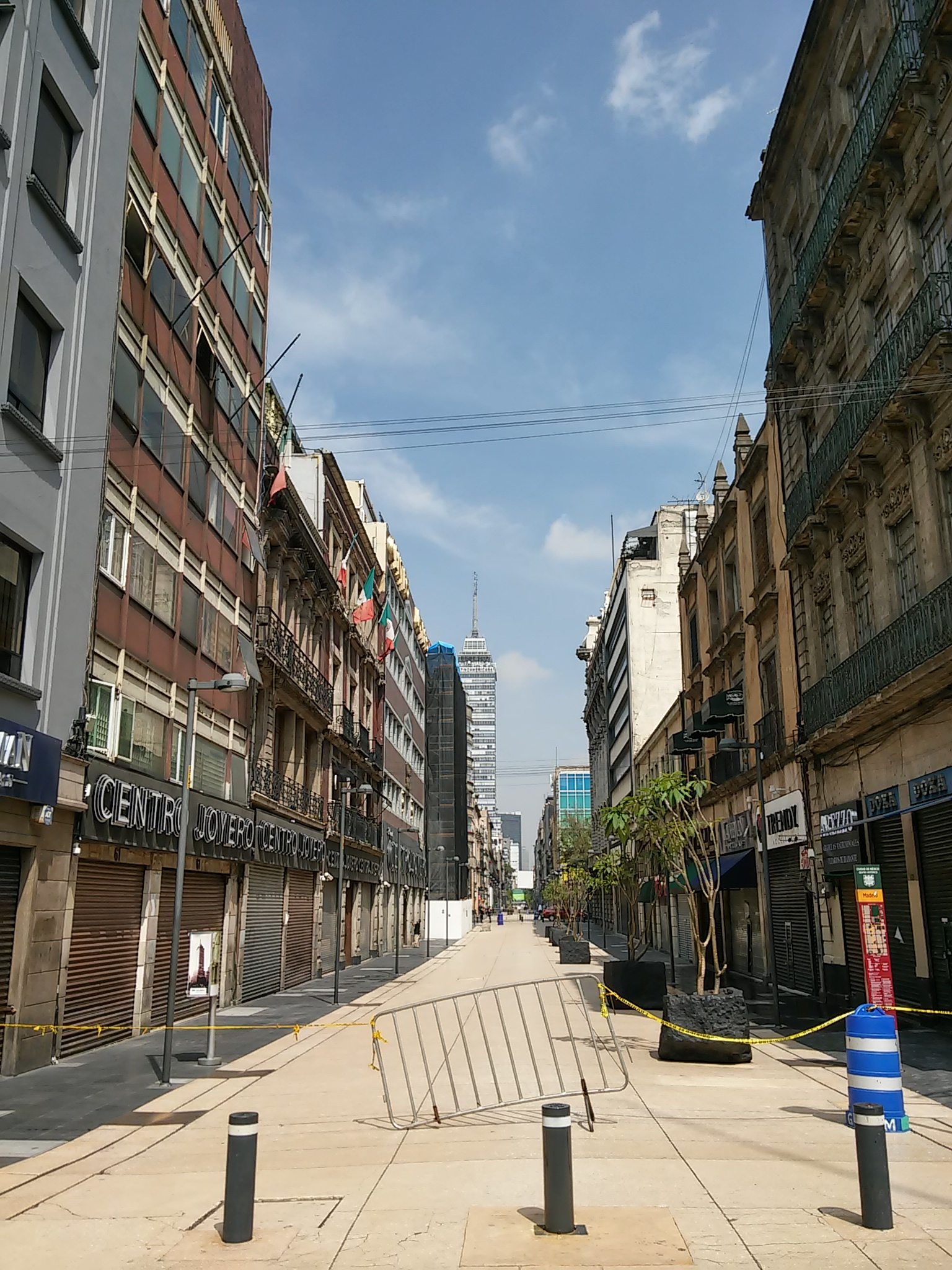 Calle de Francisco I Madero en el centro histórico de la ciudad de México, cerrada durante la pandemia mundial de COVID-19 en la primavera-verano de 2020